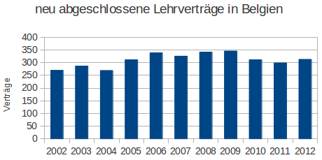 neue abgeschlossene Lehrverträge in der Deutschsprachigen Gemeinschaft Belgiens im jeweiligen Jahr (Zeitraum: 2002-2011)